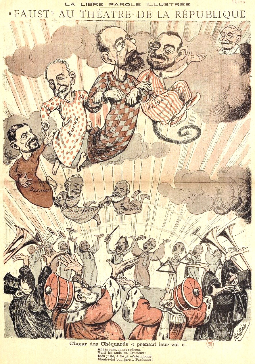 "Faust" au Théâtre de la République.